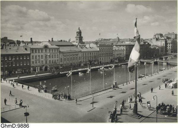 Stora Hamnkanalen i Göteborg, Fotograf Erik Månsson, juni 1951. Bildsamlingen vid Göteborgs stadsmuseum.